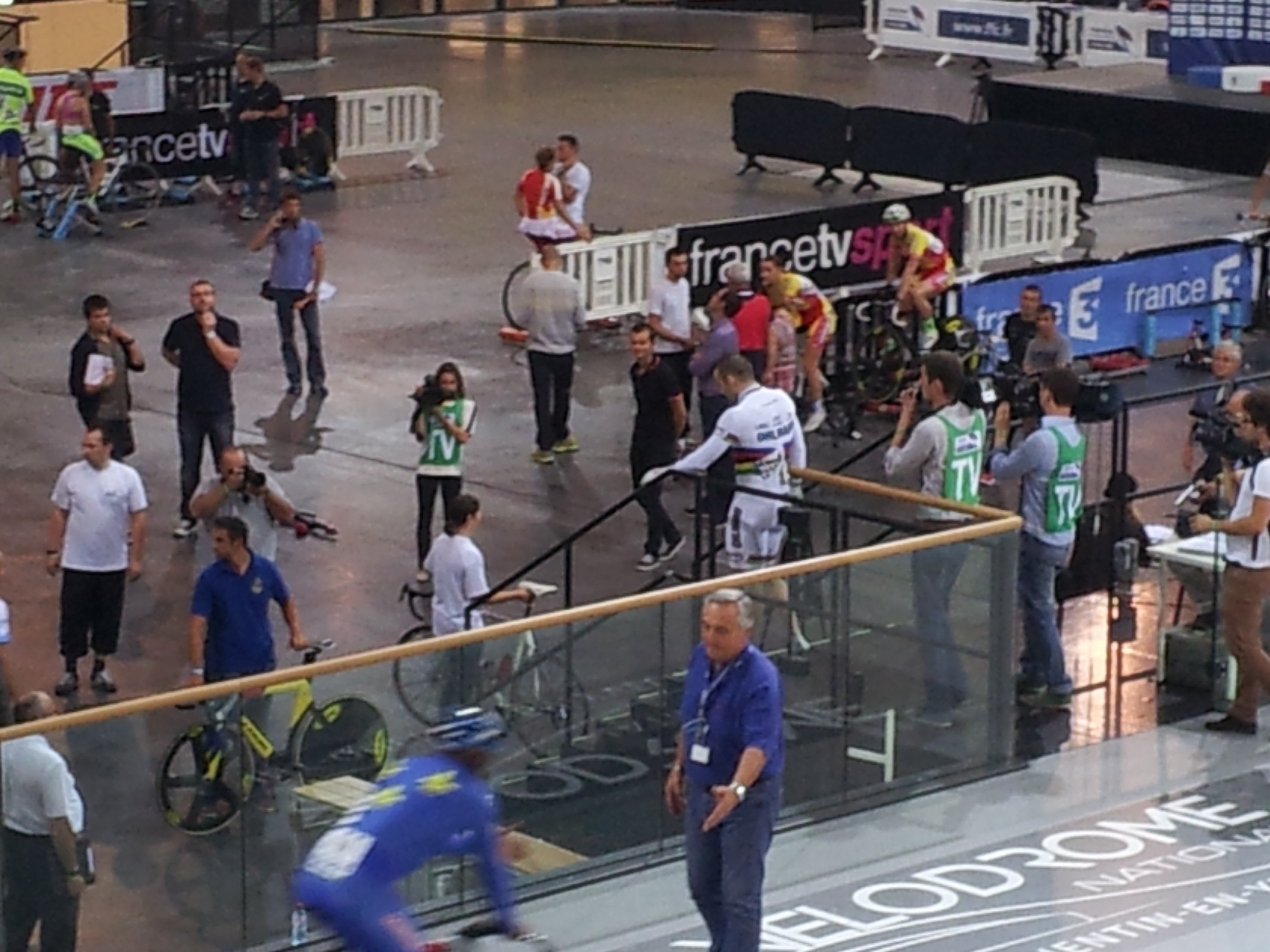 Le champion du monde François Pervis après sa victoire dans l'épreuve du Keirin aux Championnats de France